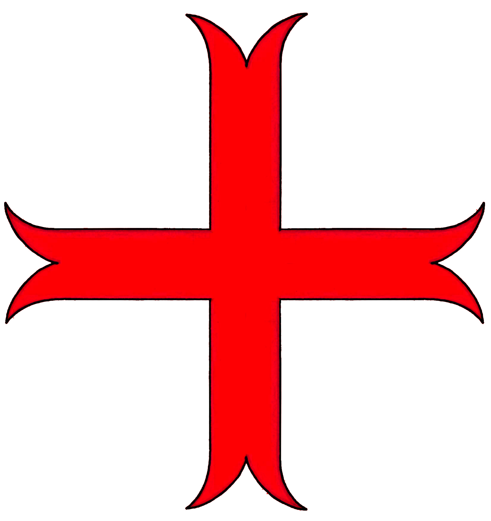 Croce bifida rossa, talvolta detta dei templari poiché usata dai Cavalieri Templari. La crooce veniva utilizzata sulle cappe rituali dei membri dell'ordine.